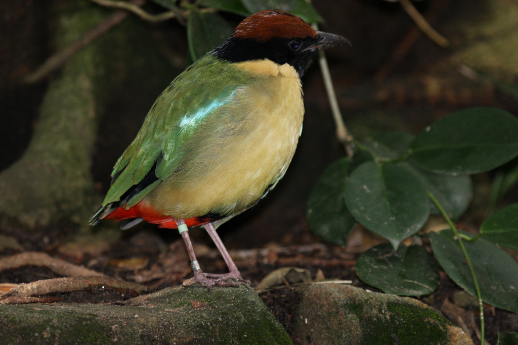 Noisy Pitta - Pitta versicolor